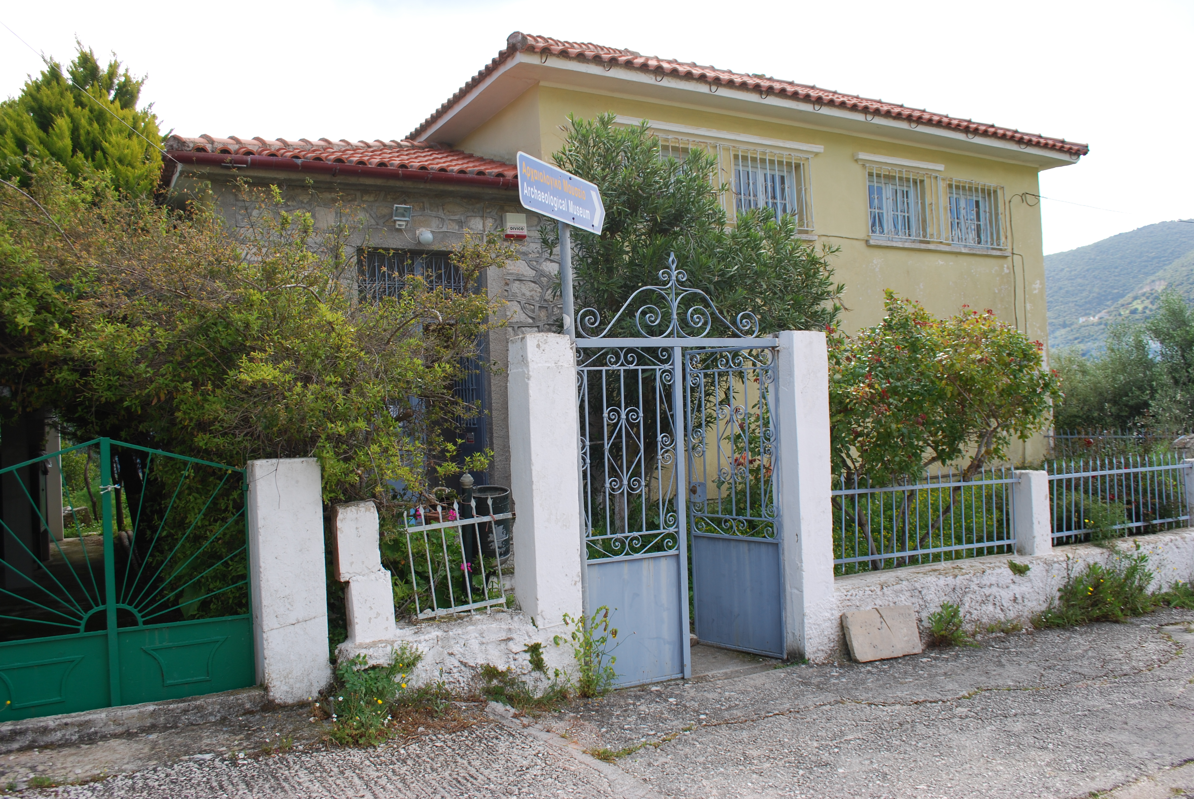 Vue d'Ithaque.